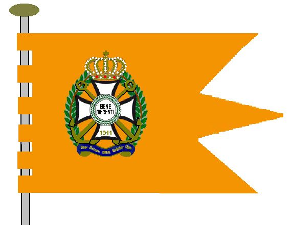 Vlag van de Royal Yacht Club Riga 1911